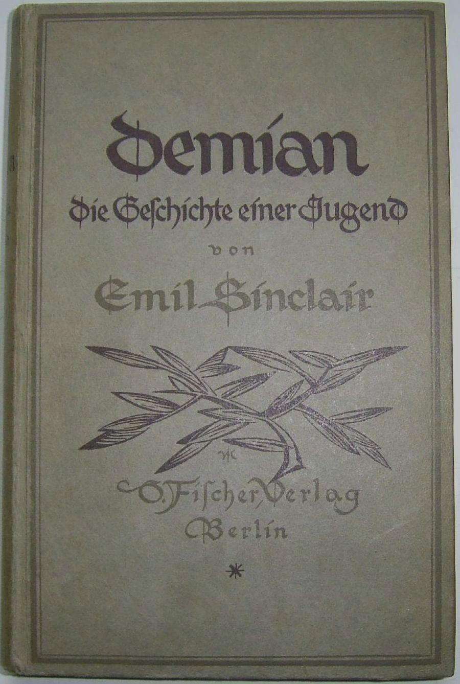 Verlagseinband der Erstausgabe Fischer Verlag 1919